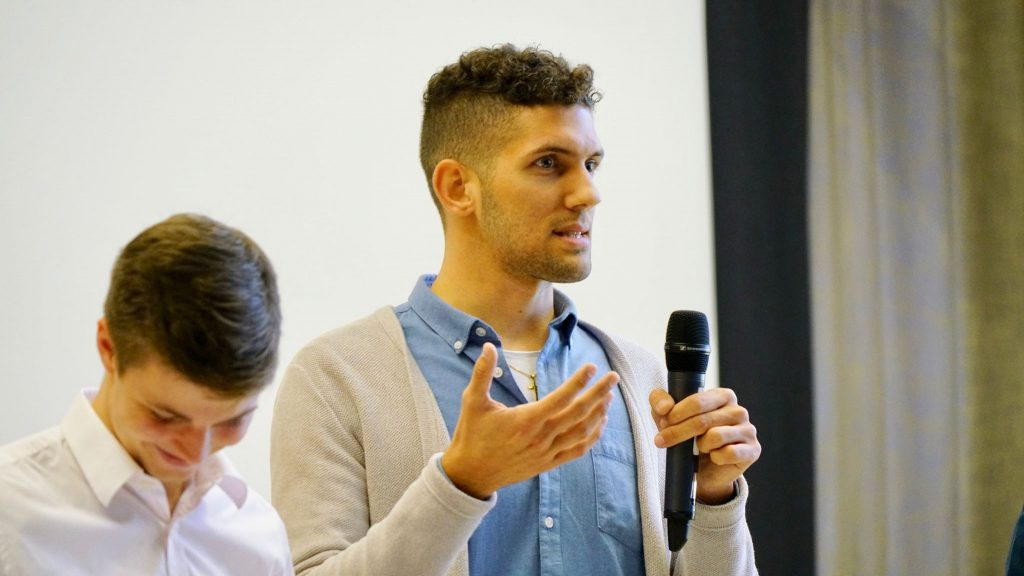 A.Bisig (2019)